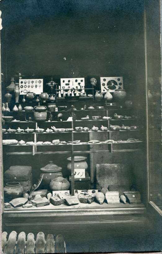 Sala Isabel (1898). Armari de la col·lecció d'arqueologia, amb la mostra de ceràmica etrusca, púnica i romana, Anells, mosaics i urnes funeràries.